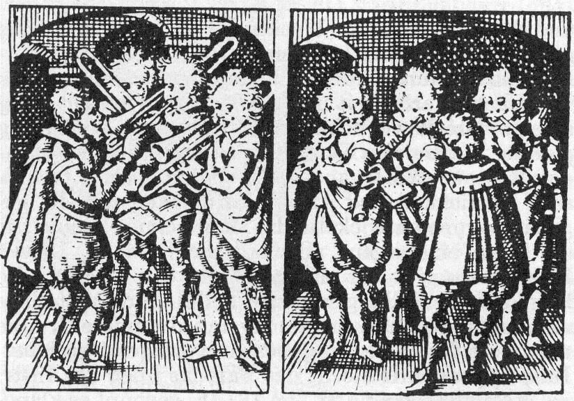 Bläser auf dem Titelblatt des „Israelsbrünnlein“ von Johann Hermann Schein